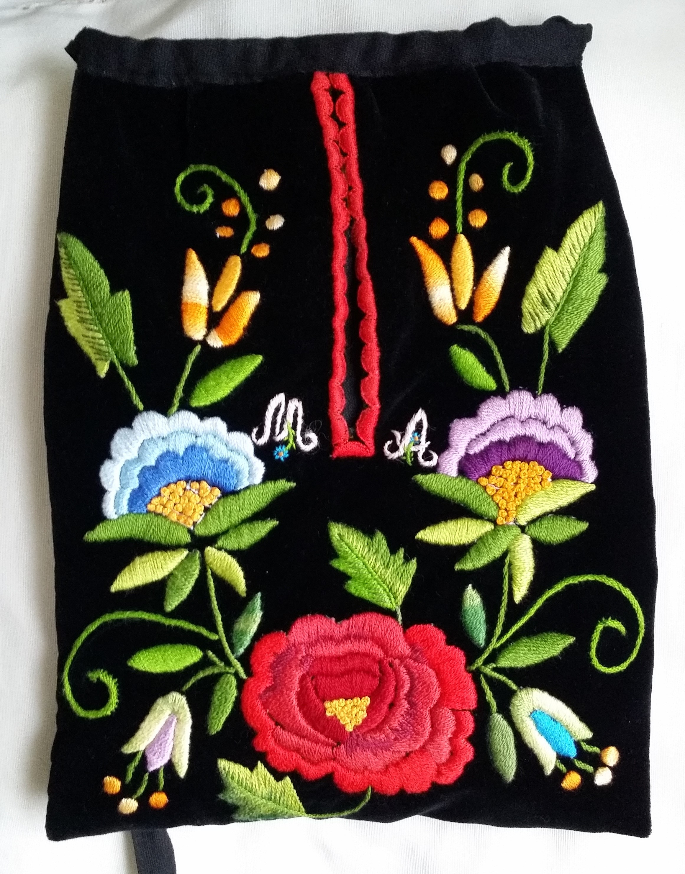 Faltriquera realizada por María Araujo Carrillo para el traje regional de Extremadura.